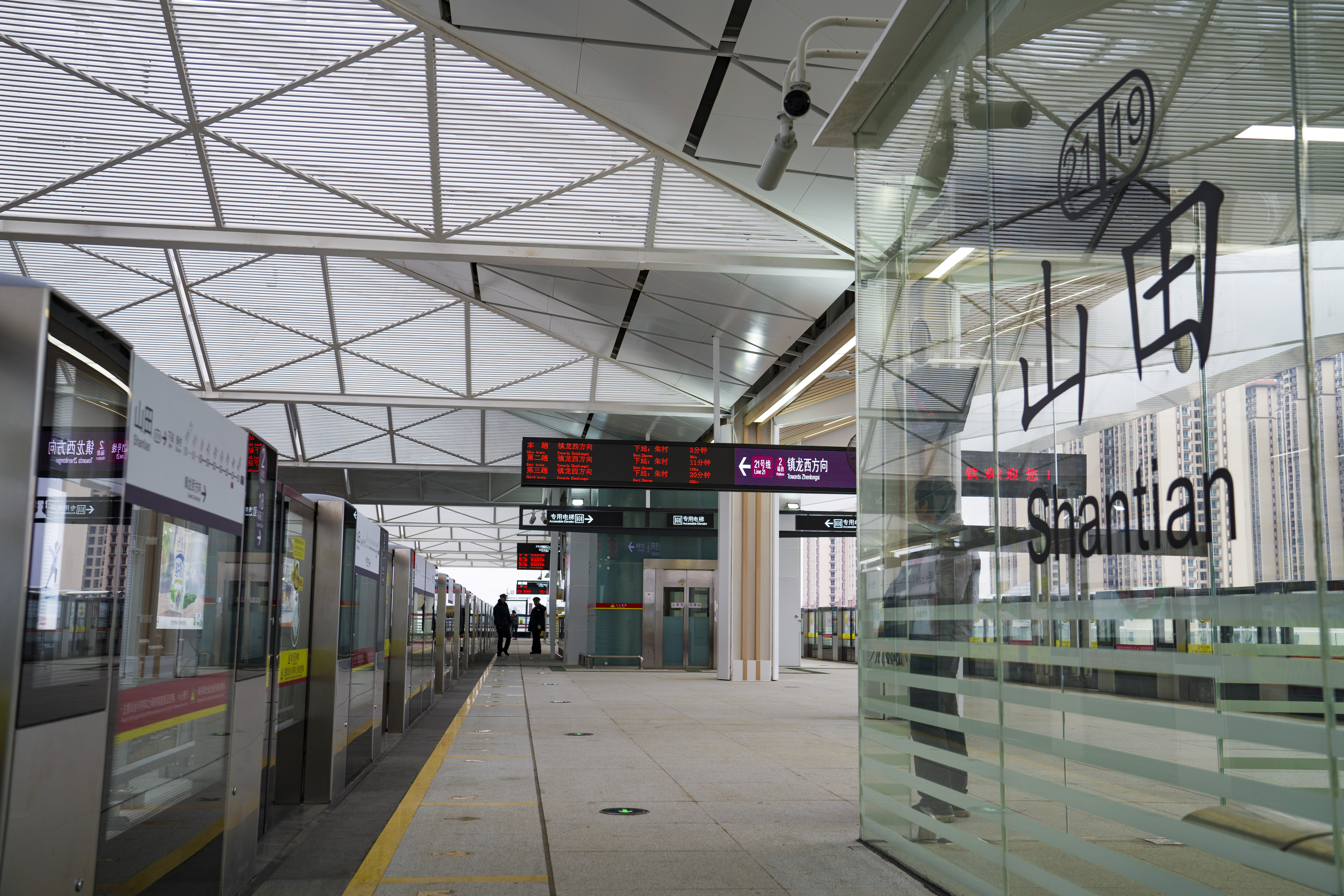 山田站二号月台